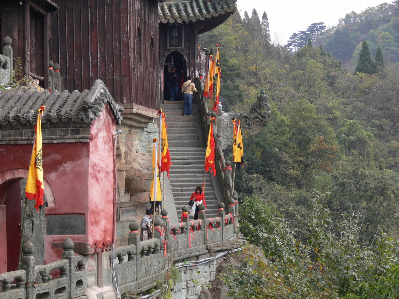 中文（中国大陆）: 武当山南岩宫